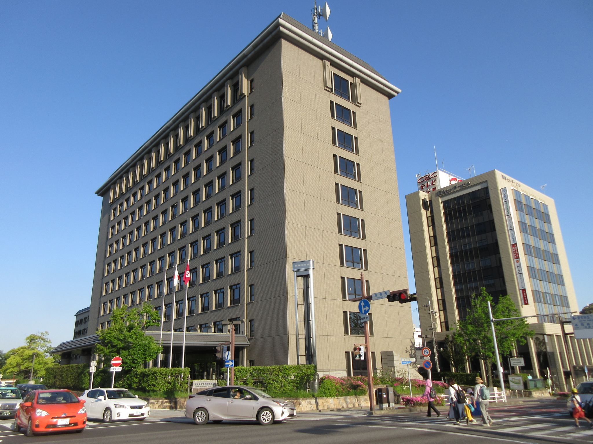 愛知県西三河総合庁舎、愛知県岡崎市明大寺本町1丁目4